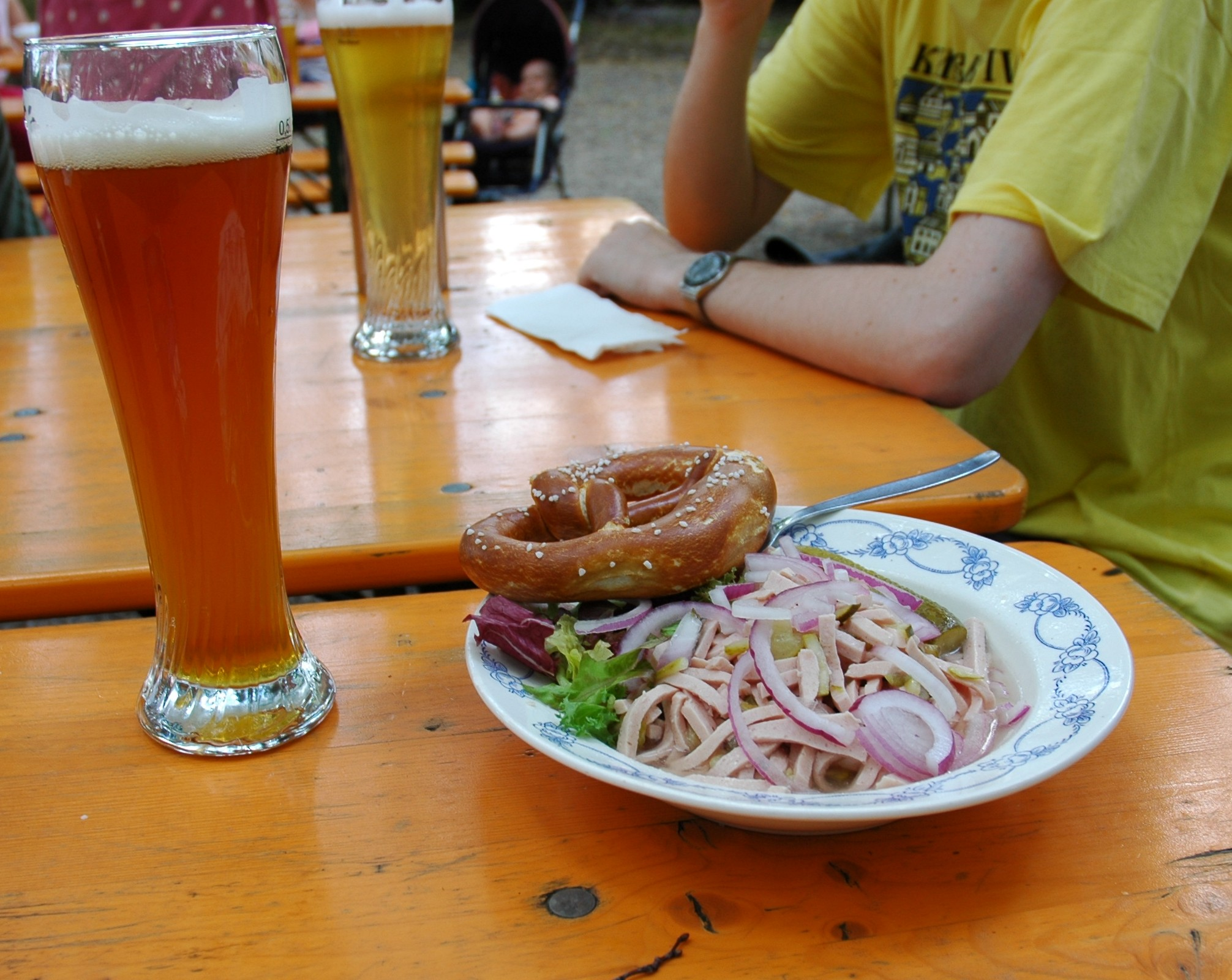 Eine Brotzeit im Biergarten